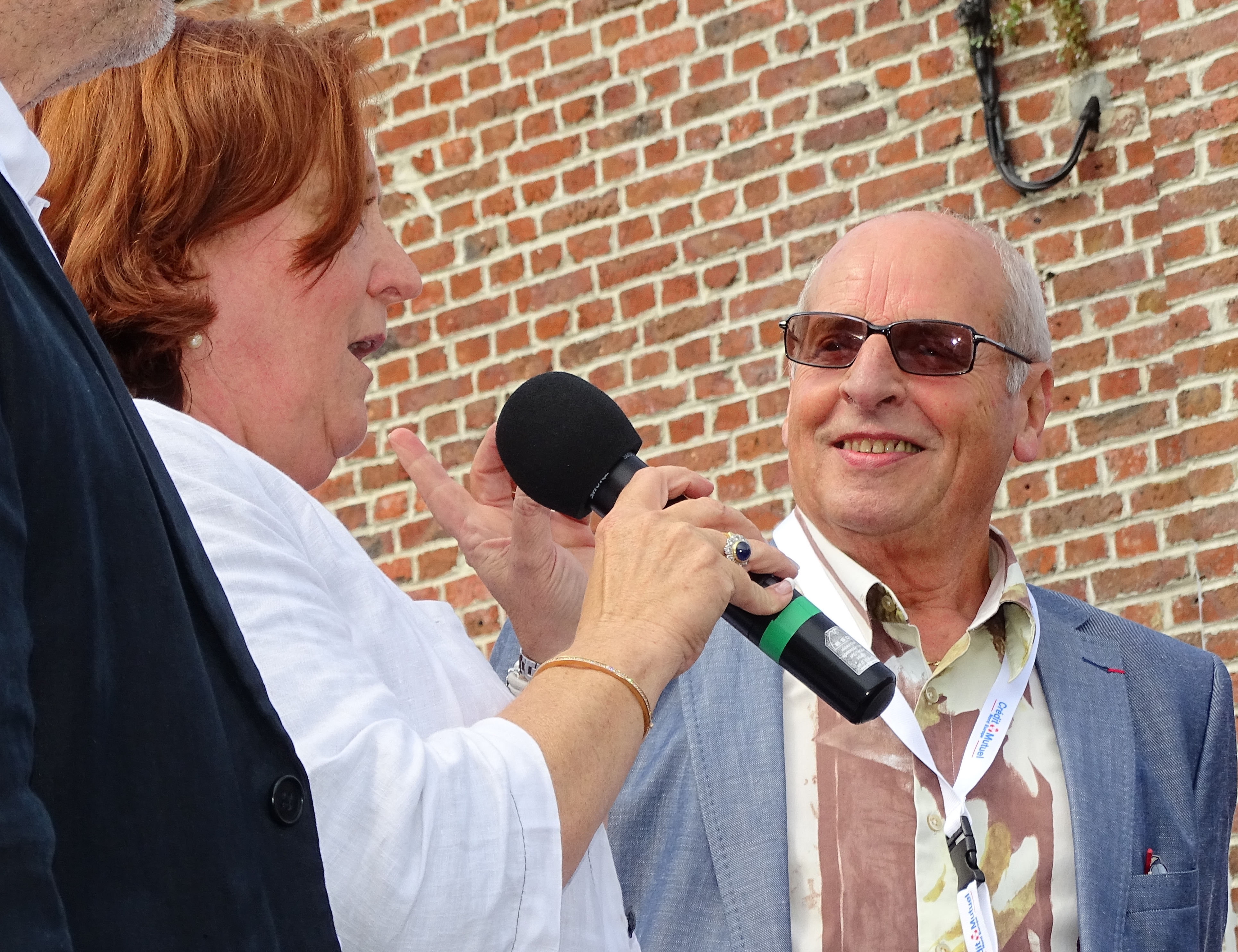 Reportage réalisé le mardi 25 août à l'occasion du départ et de l'arrivée du Grand Prix des Marbriers 2015 à Bellignies, Nord-Pas-de-Calais, France.